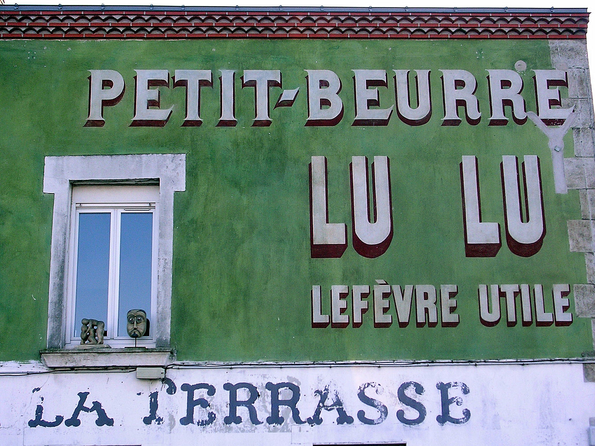 Publicité murale pour la marque LU à Trentemoult. Photo prise par Jibi44